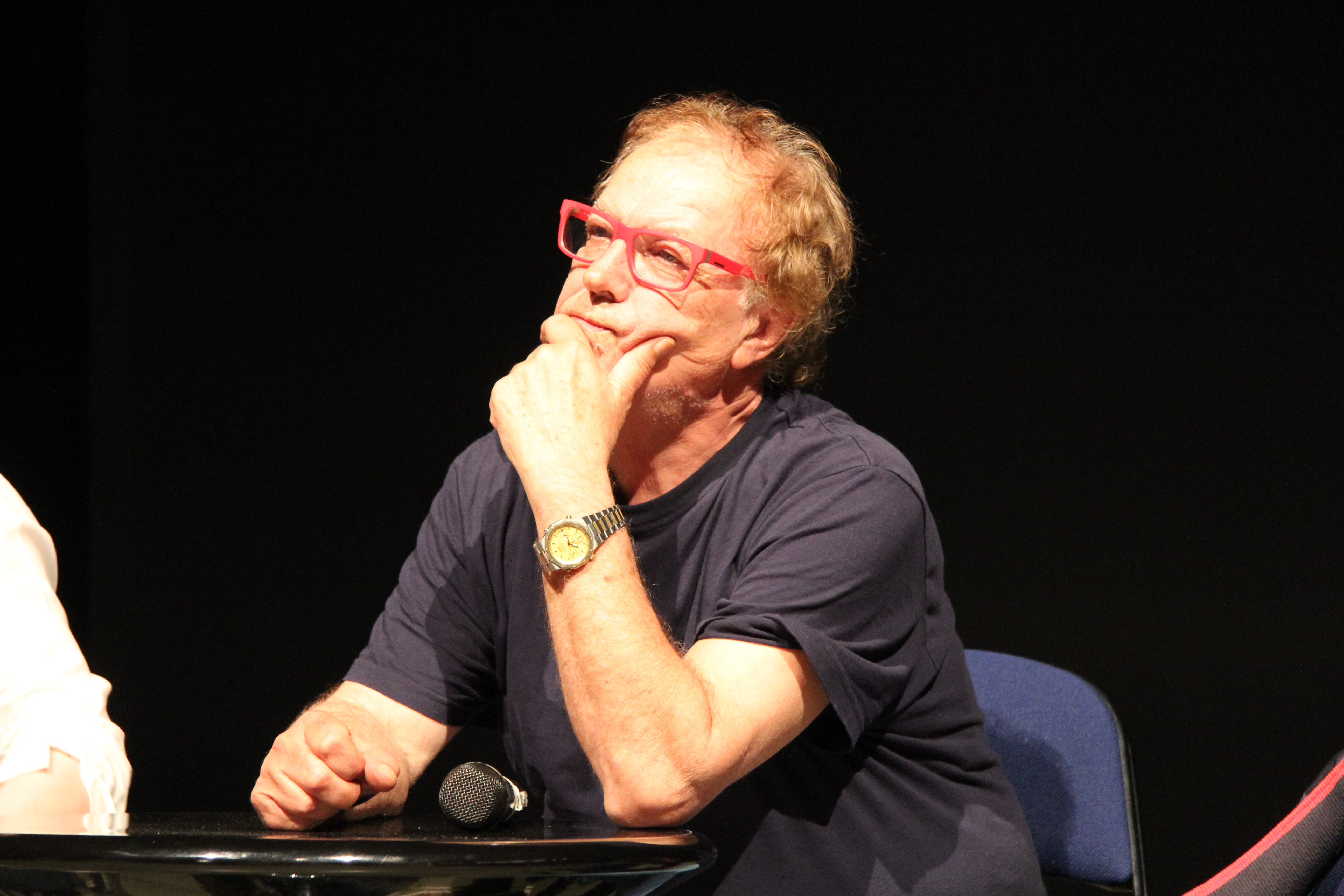 Lordan Zafranović v pražské La Fabrice (2015)